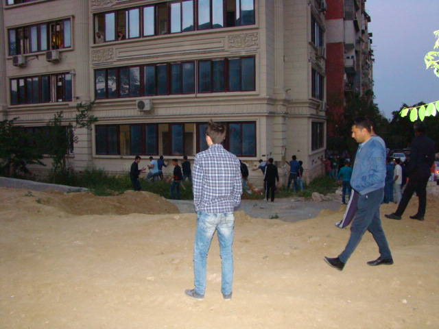 Azadlıq prospektində yanan binaya etiraz edən qonşu binanın sakinləri üzlük materialı sındırırlar